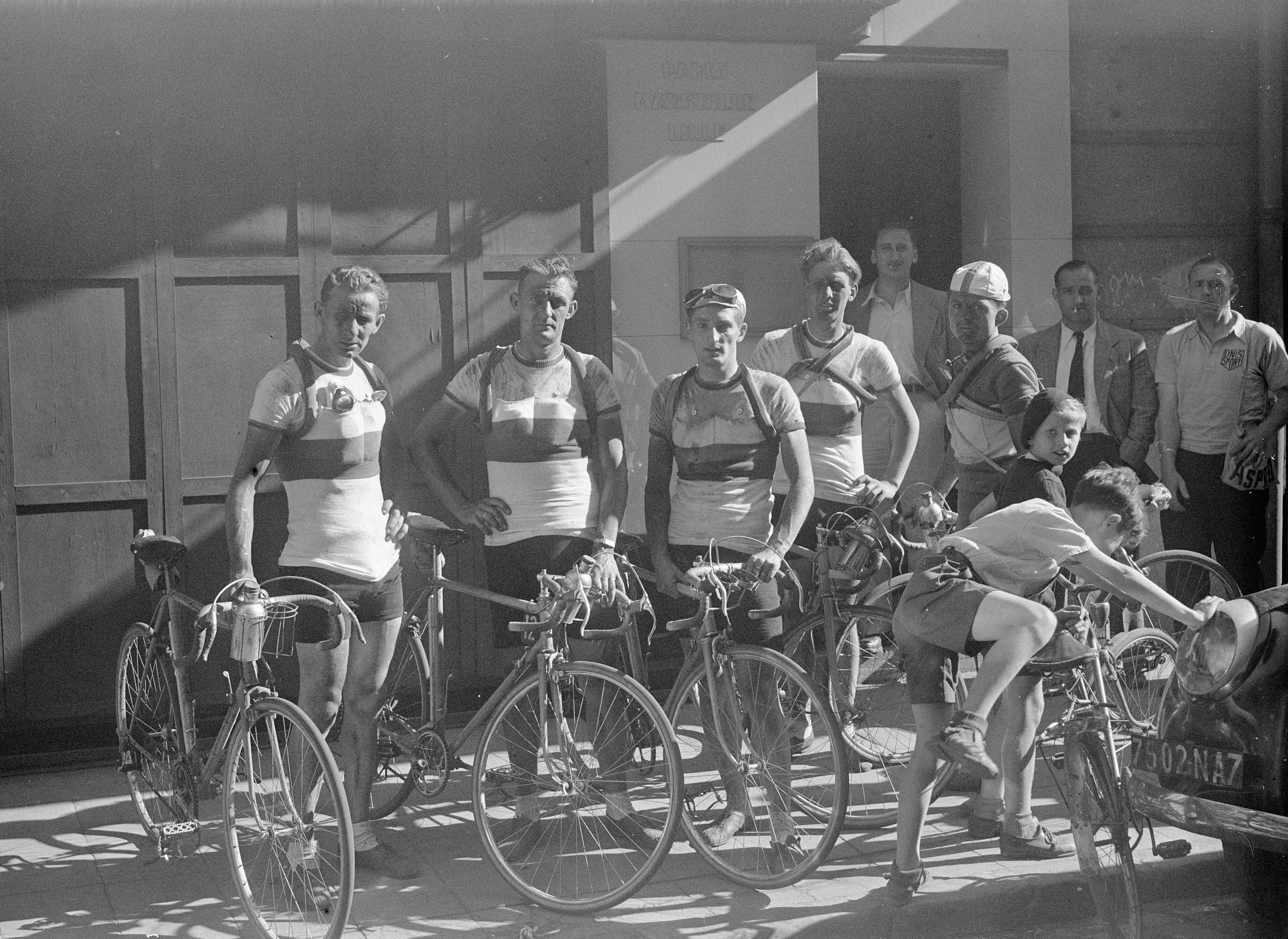 De Nederlandse ploeg voor het hotel in Rijssel.